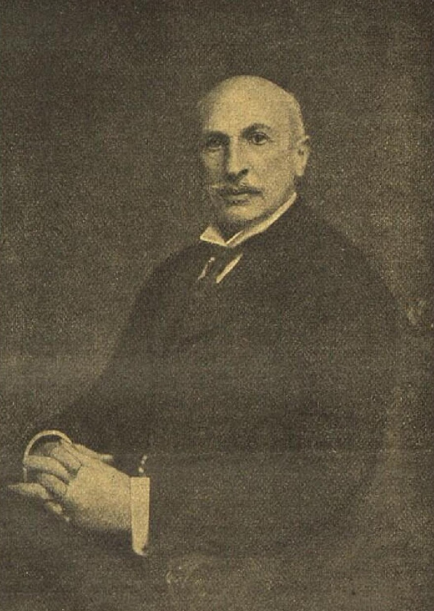 Jindřich Ronz (1849-1916), rakouský a český podnikatel a politik